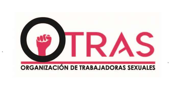 El Sindicato OTRAS es un sindicato de trabajadoras sexaules de España